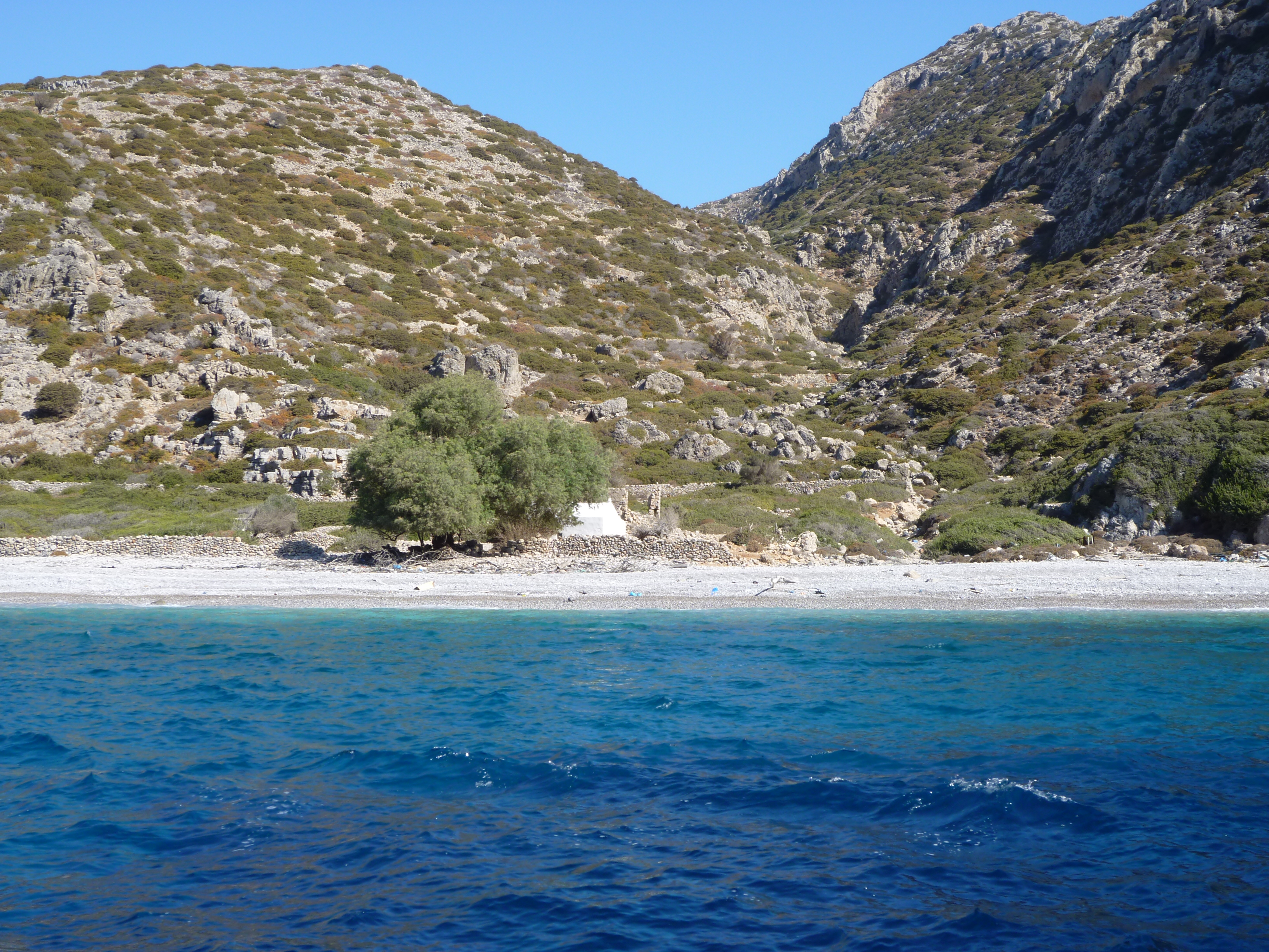 Blick auf die Küste der unbewohnten Insel Saria, nördlich von Karpathos gelegen.